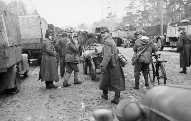 Scherl: Auf einer Verbindungsstraße zwischen Ilmensee und Finnischem Meerbusen Im Zuge der Frontverkürzung gehen Einheiten in planmäßiger Ordnung in die ihnen neu zugewiesenen Stellungen. Achtung! PK-Aufnahme Kriegsberichter Reimers 28.2.44 [Herausgabedatum] Zentralbild: II. Weltkrieg 1939-45 An der Front in der Sowjetunion. Ende Februar 1944. Bei der sowjetischen Offensive zur Befreiung des Leningrader Gebietes Januar-März 1944 räumen die deutschen Truppen das ganze Gebiet zwischen Ilmensee und Finnischem Meerbusen bis zum Peipus-See.